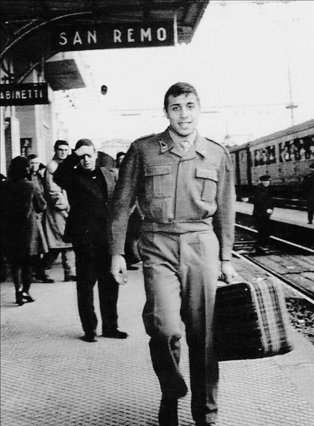 Soldato italiano